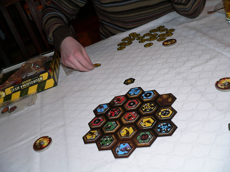 Playing Neuroshima HEX